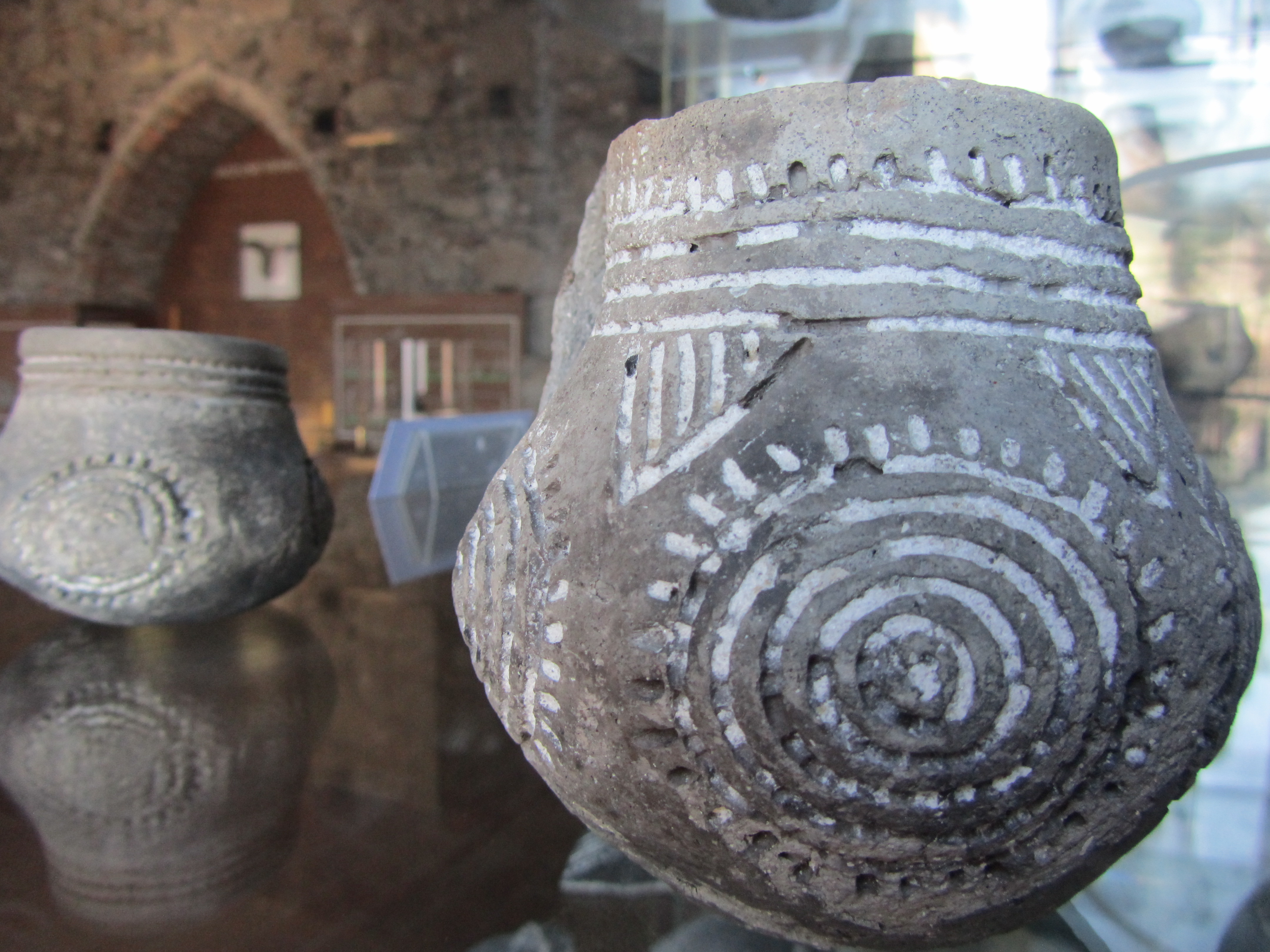 Pfahlbaumuseum Mondsee